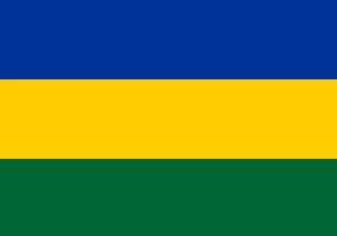 Прапор "ятвязького руху" у Білорусі 90-х років ХХ ст.